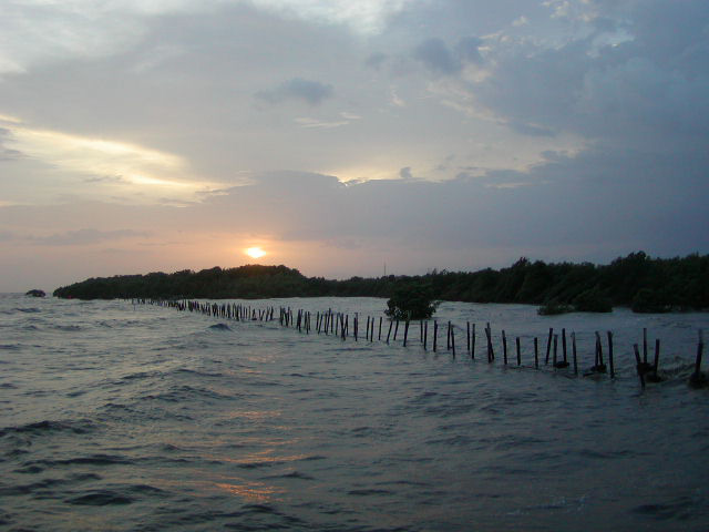 ภาพป่าชายเลนบางปู ถ่ายเมื่อ 11 กรกฎาคม 2545